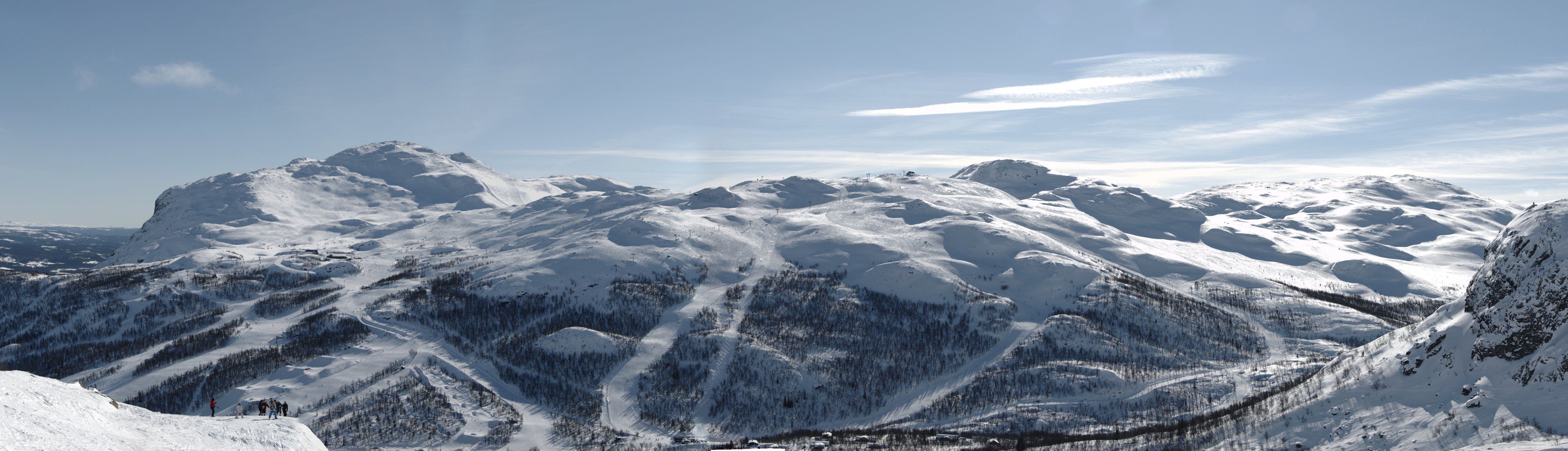 Hemsedal skisenter